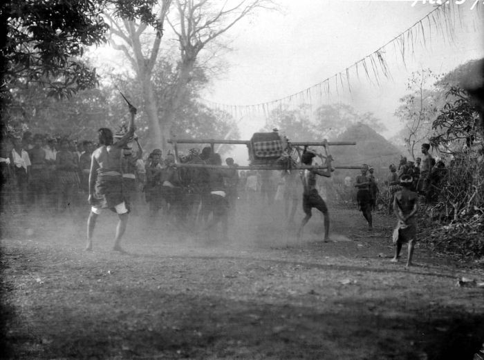 Negatief. Mensen in optocht tijdens een godsdienstig feest te Boegboeg op Bali.